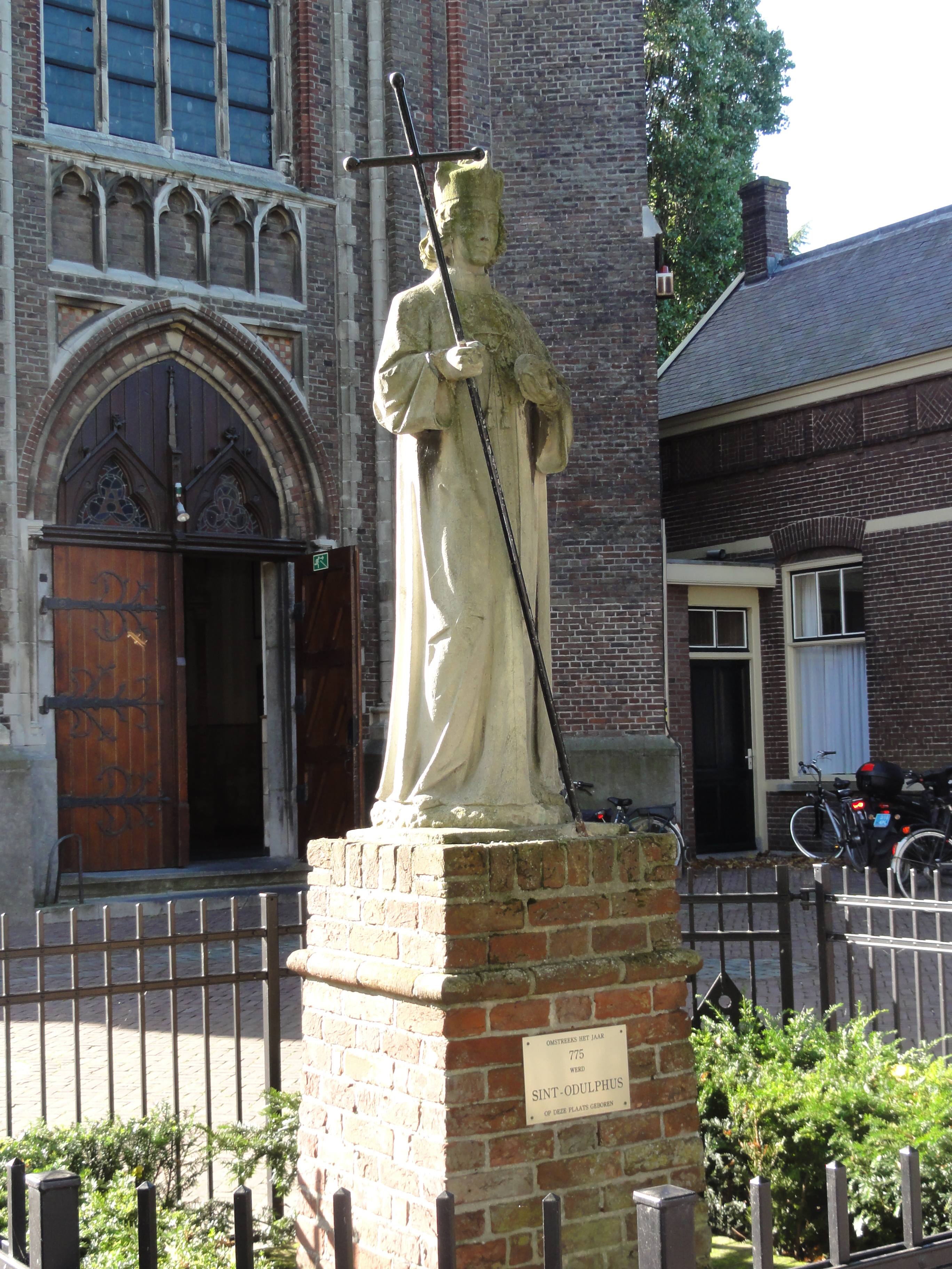 Best Rijksmonument 515261 beeld H.Odulphus bij de kerk 04″ N, 5° 17′ 38.28″ E